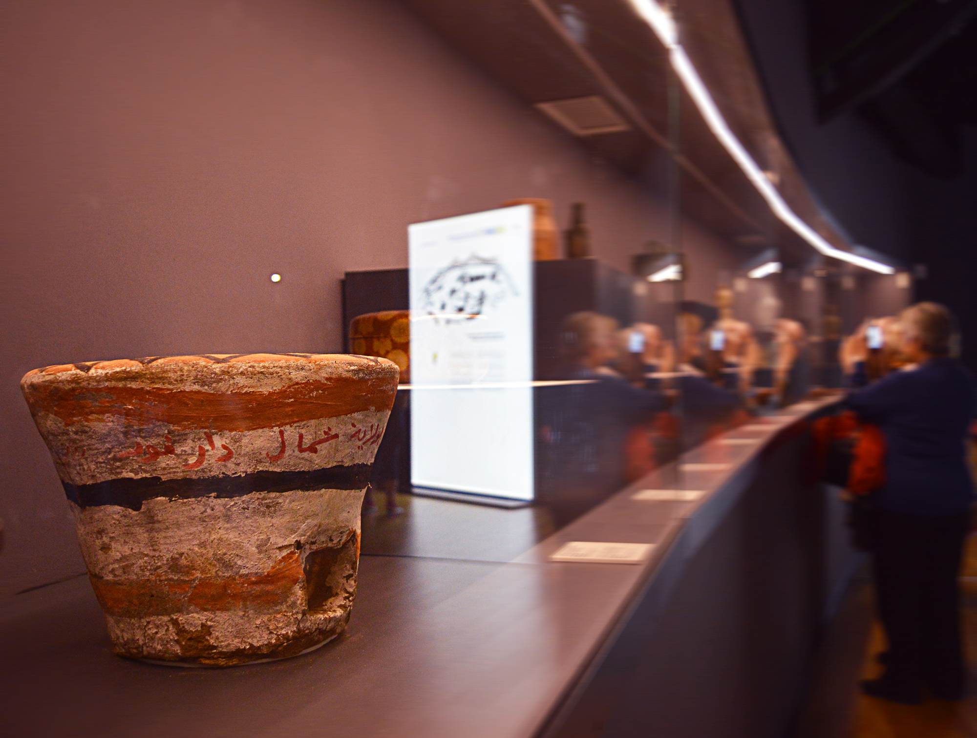 Particolare di un reperto archeologico esposto nella sala dei recipienti al Padiglione Zero di EXPO Milano 2015